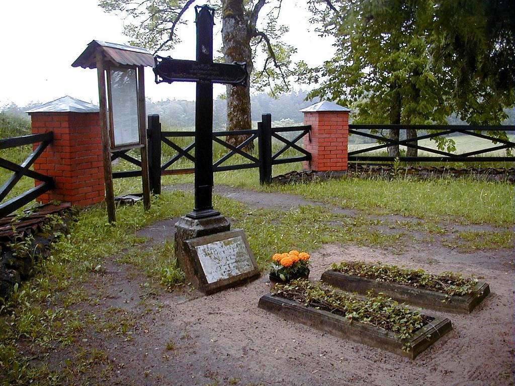 Amendas kaps Stūrīšos 2004-06-12